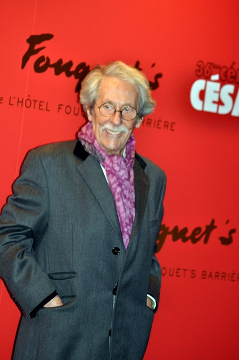 Jean Rochefort à la cérémonie des César du cinéma